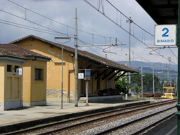 Figline Valdarno_F.S_altra veduta